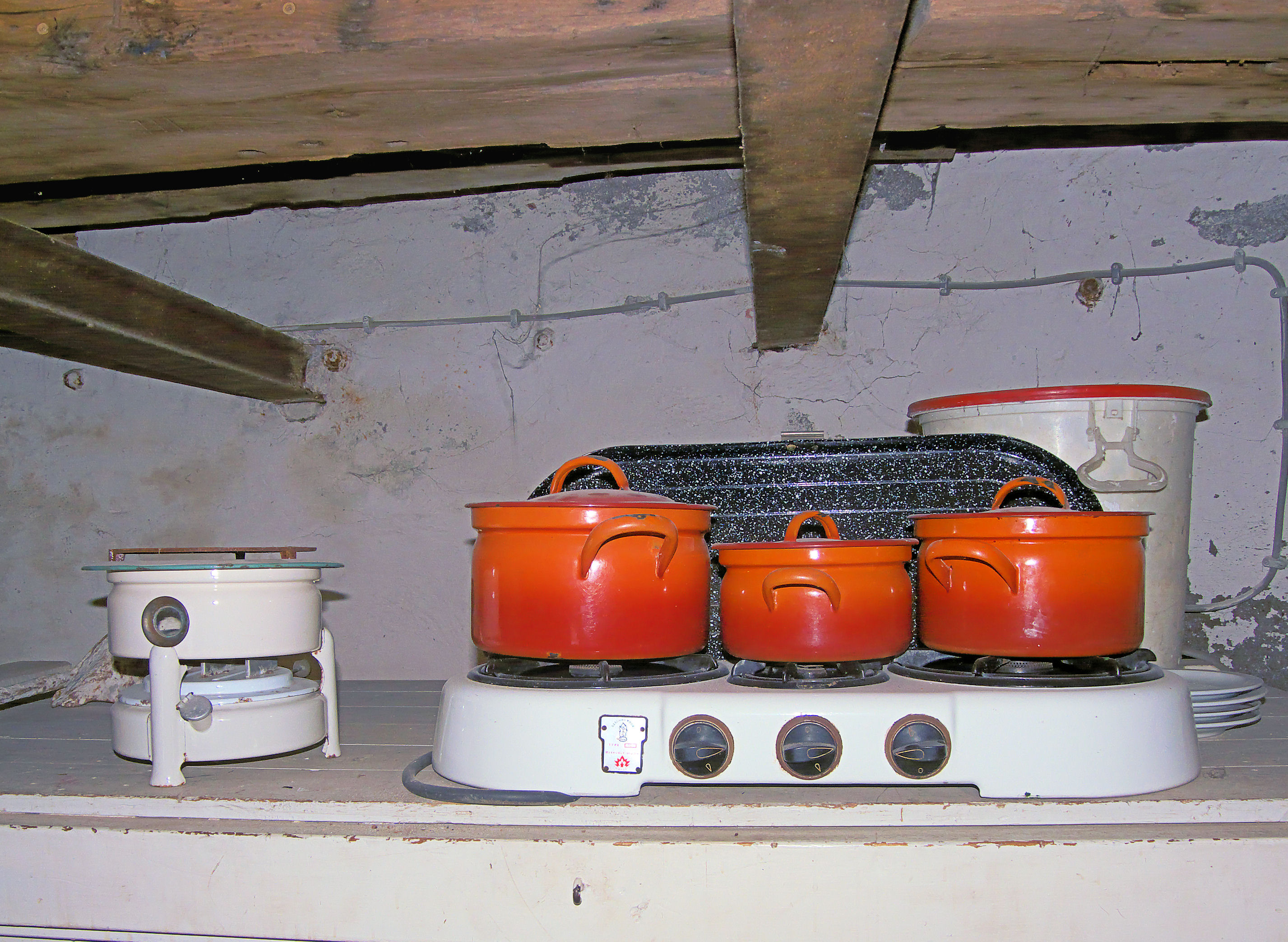 Emmamolen Nieuwkuijk, petroleumstel (links) en butagaskookplaat